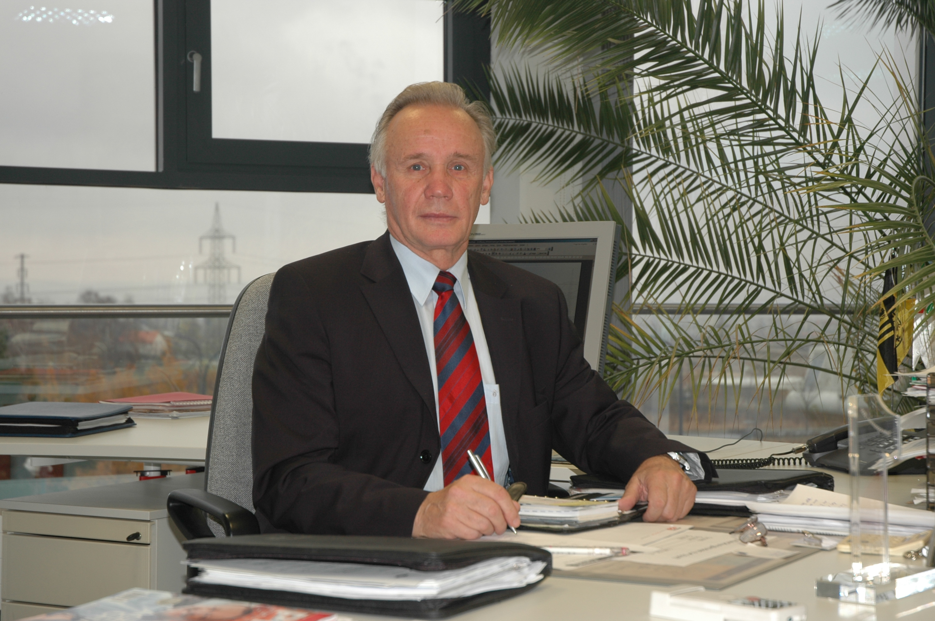 Rolf Heinemann am Schreibtisch bei Robotron Datenbank-Software Gmbh, Dresden, Stuttgarter Straße 29